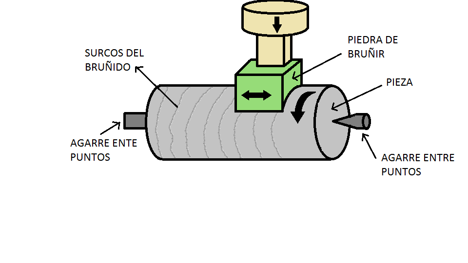 Bruñido de exteriores